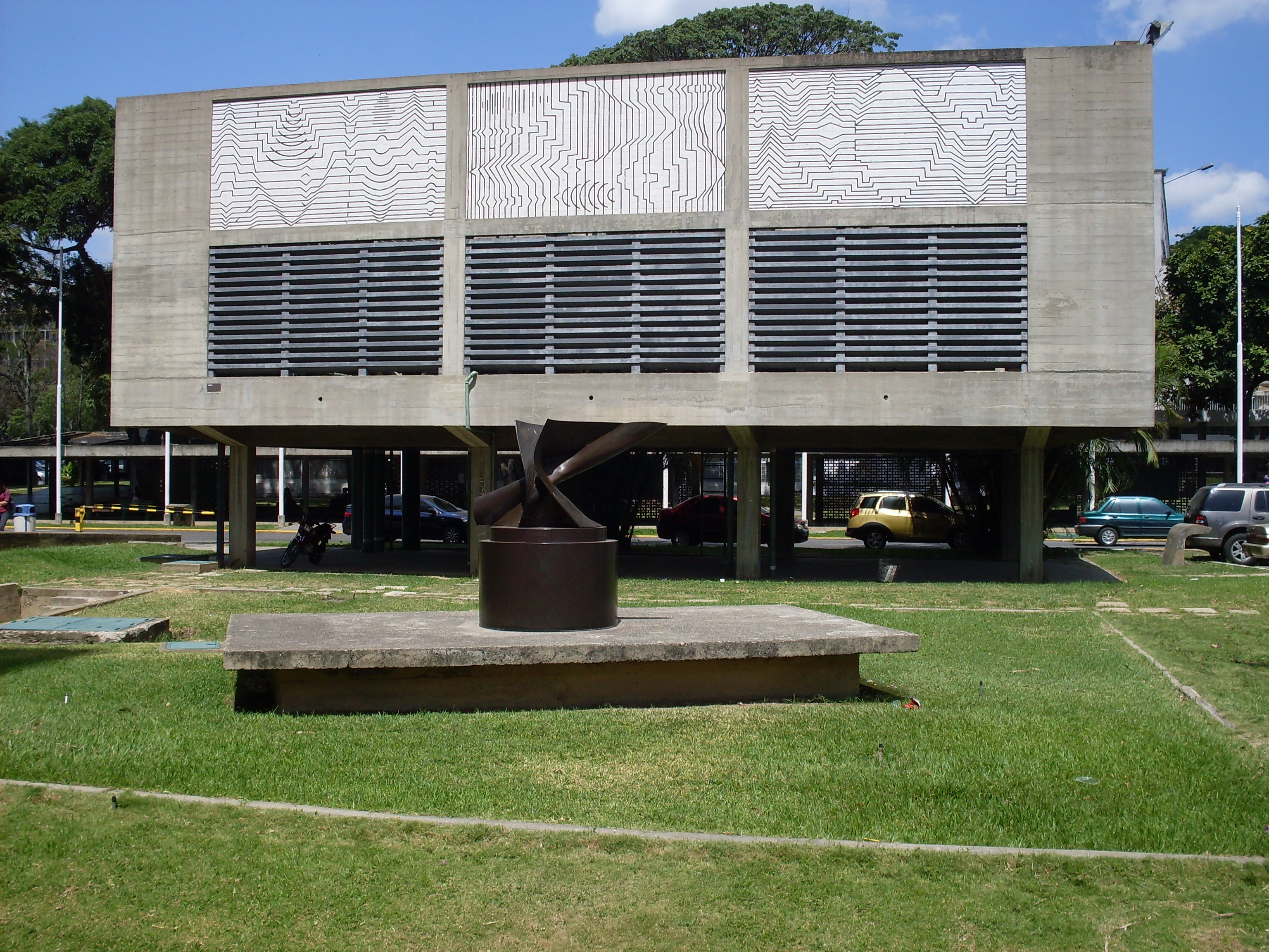 Mural en la Universidad Central de Venezuela. Al frente se ve la escultura de Antoine Pevsner, "El Dinamismo en 30 grados" Título: Sophia Autor: Víctor Vasarely Año: 1954 Ubicación: Universidad Central de Venezuela, torre de enfriamiento del Aula Magna.